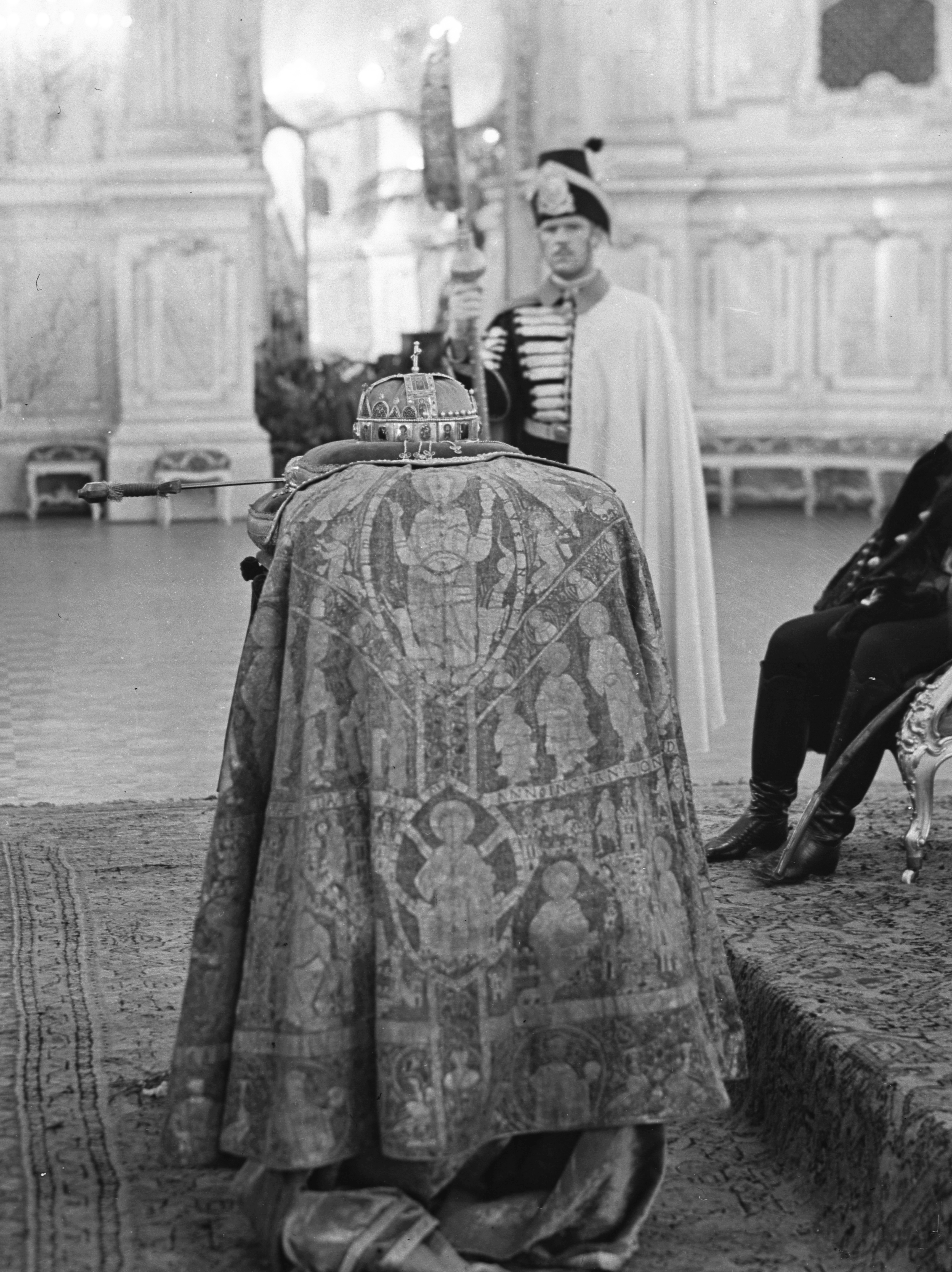 Királyi Palota bálterme, a közszemlére helyezett Szent Korona és a koronázási ékszerek. Location: Hungary, Budapest I. Tags: guard, crown, crown guards, Budapest Title: Királyi Palota bálterme, a közszemlére helyezett Szent Korona és a koronázási ékszerek.